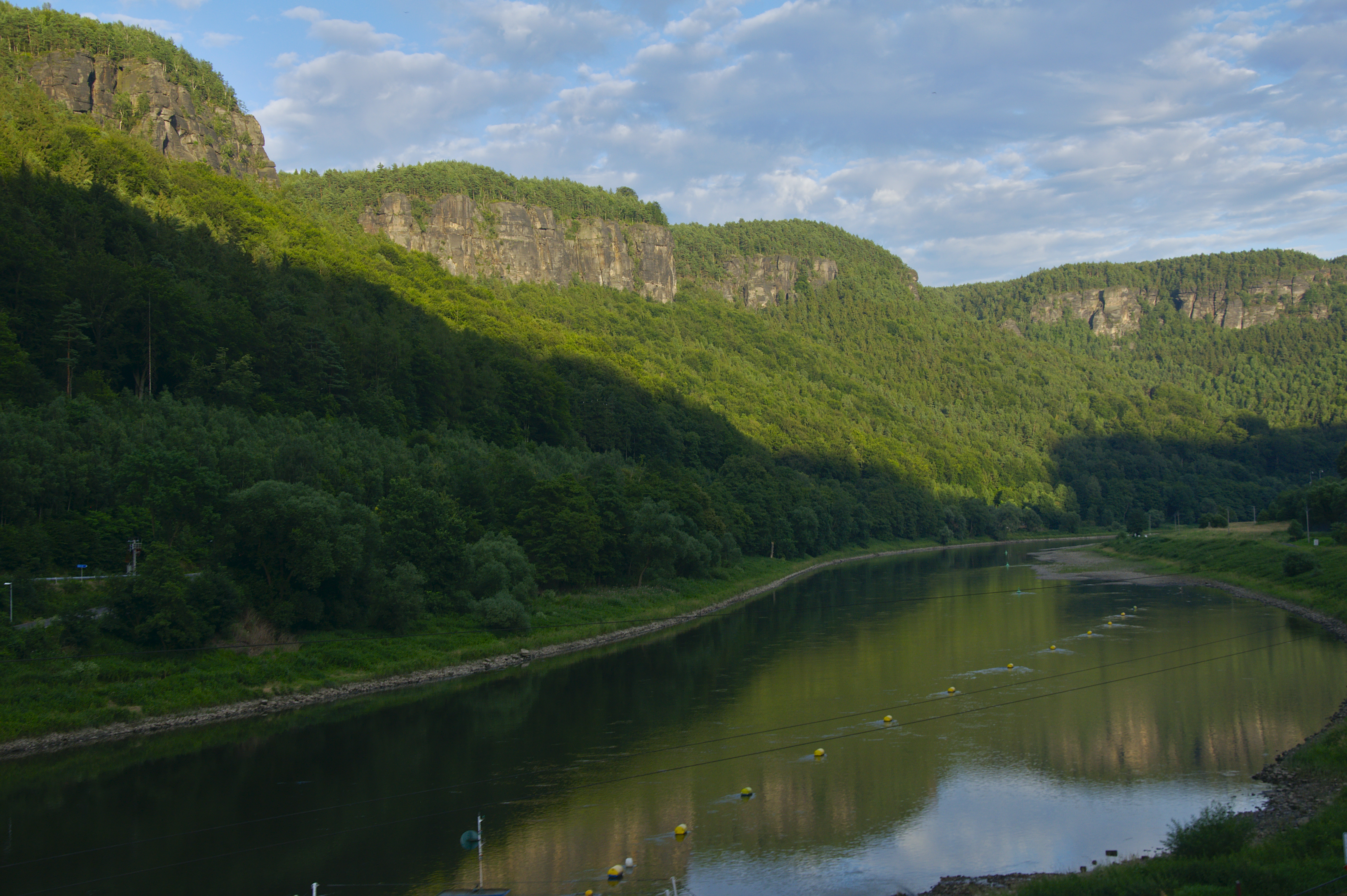 Národní přírodní rezervace Kaňon Labe, okres Děčín